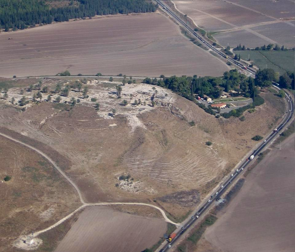 Tel Megiddo